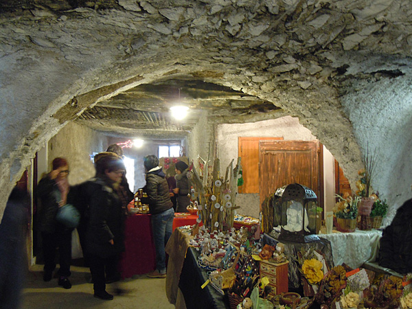 Marcatino di Natale di Rango sotto gli antichi volti.